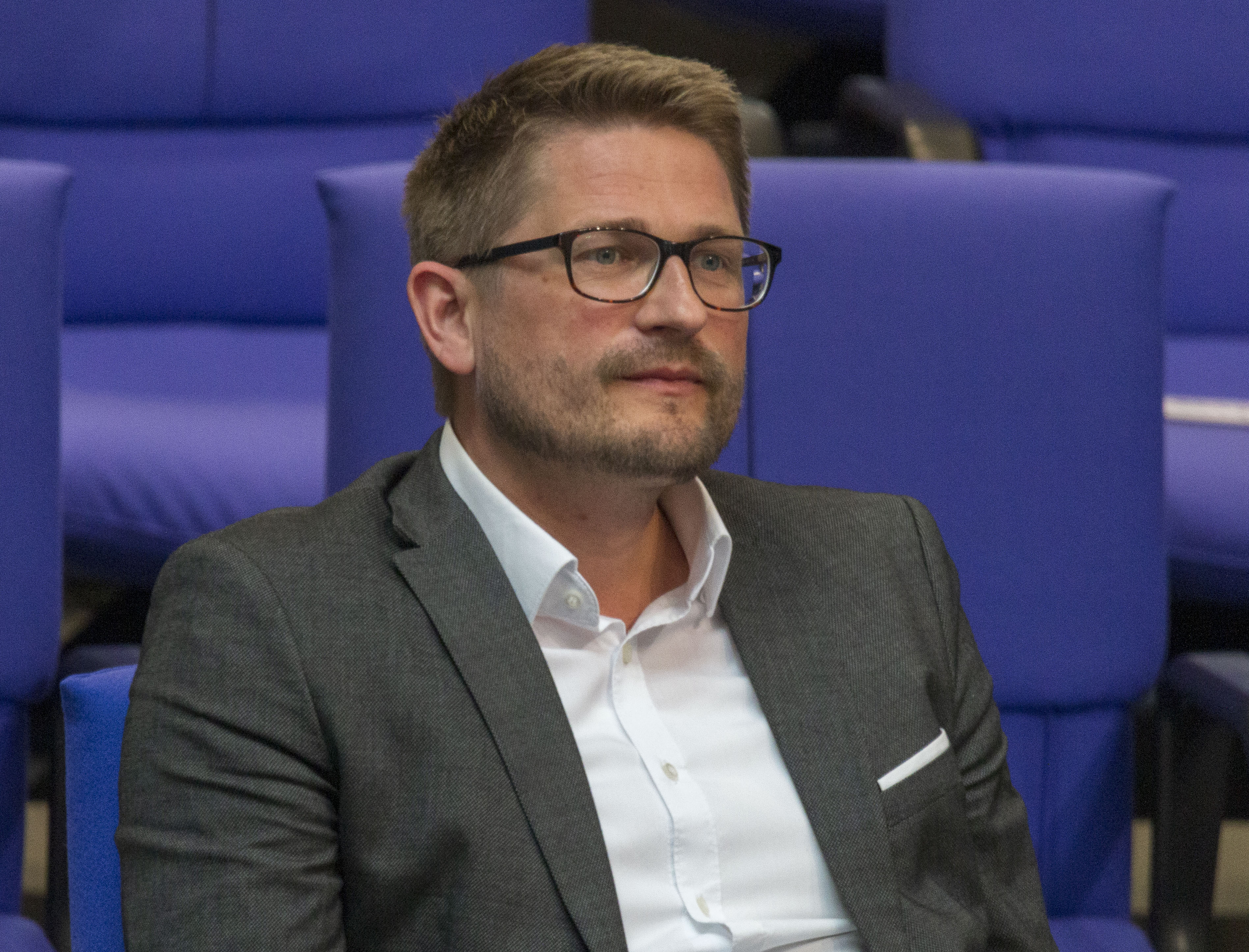 René Springer, Bundestagsabgeordneter der AfD während der Plenarsitzung des Deutschen Bundestages am 2. Juli 2020 in Berlin.